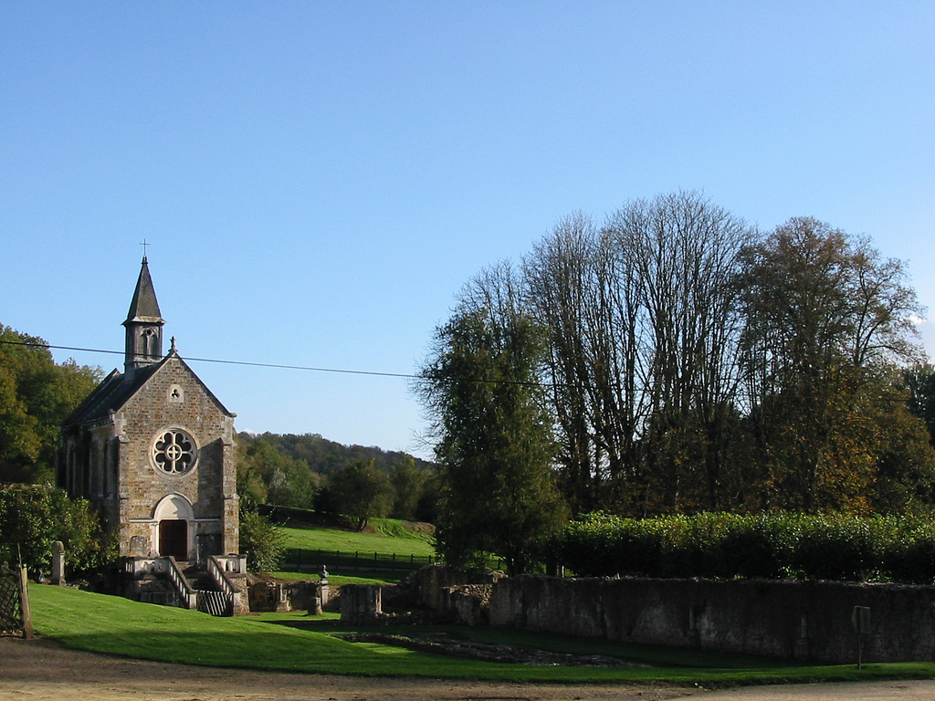 Oratoire de Port Royal des Champs